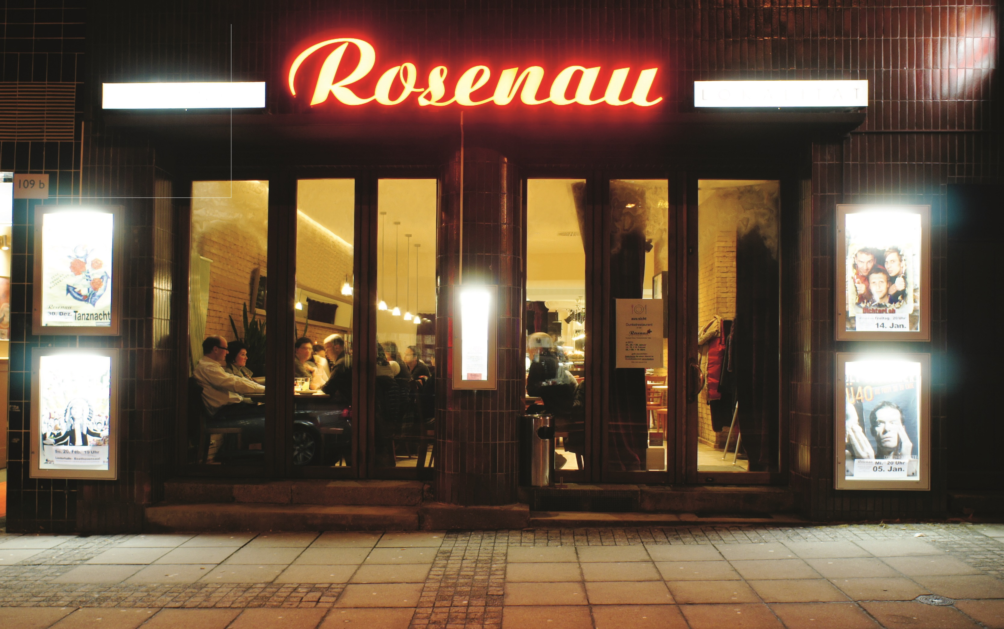 Außenansicht der Rosenau im Jahr 2011.